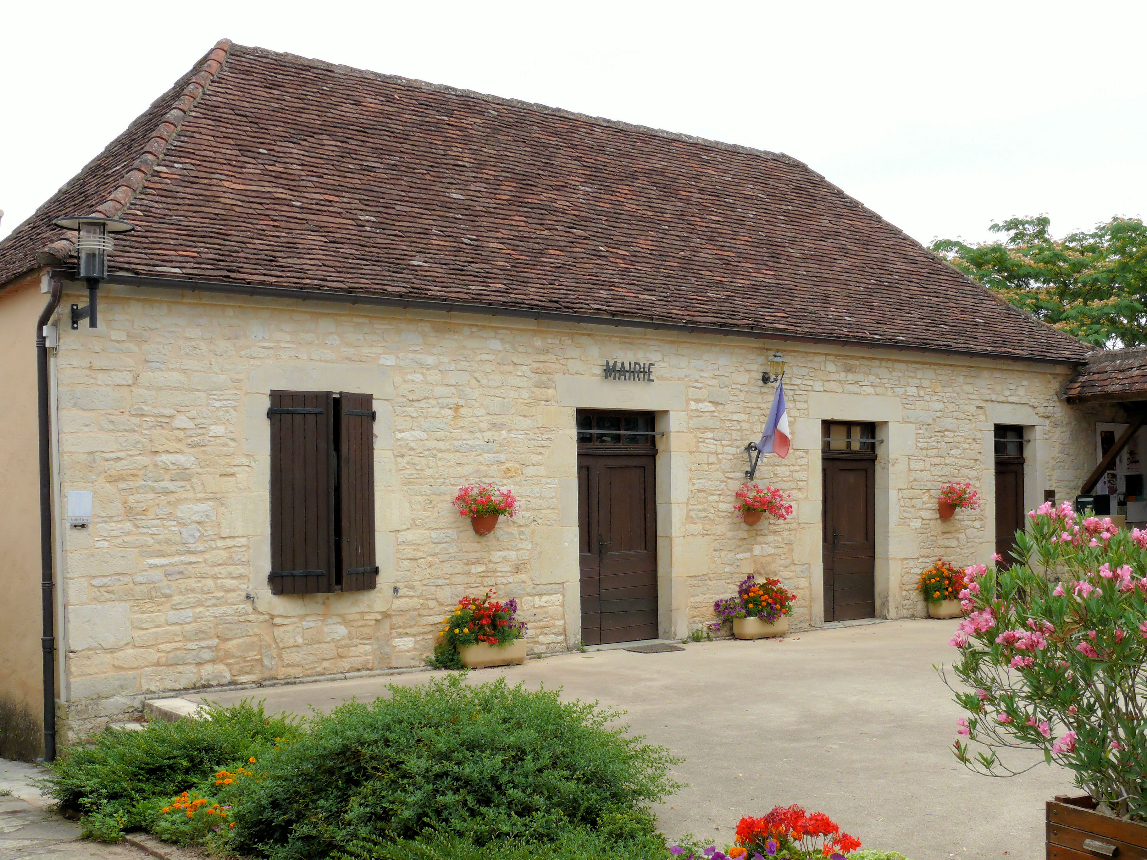 Les Arques - Mairie